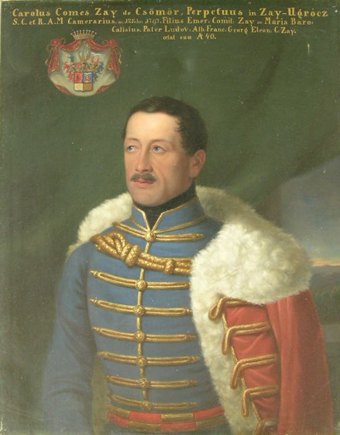 Zay Károly Miksa gróf, szabadelvű politikus, császári és királyi kamarás, evangélikus egyházi főfelügyelő.